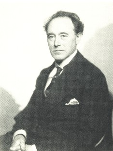 Porträt des Komponisten Felix von Weingartner.